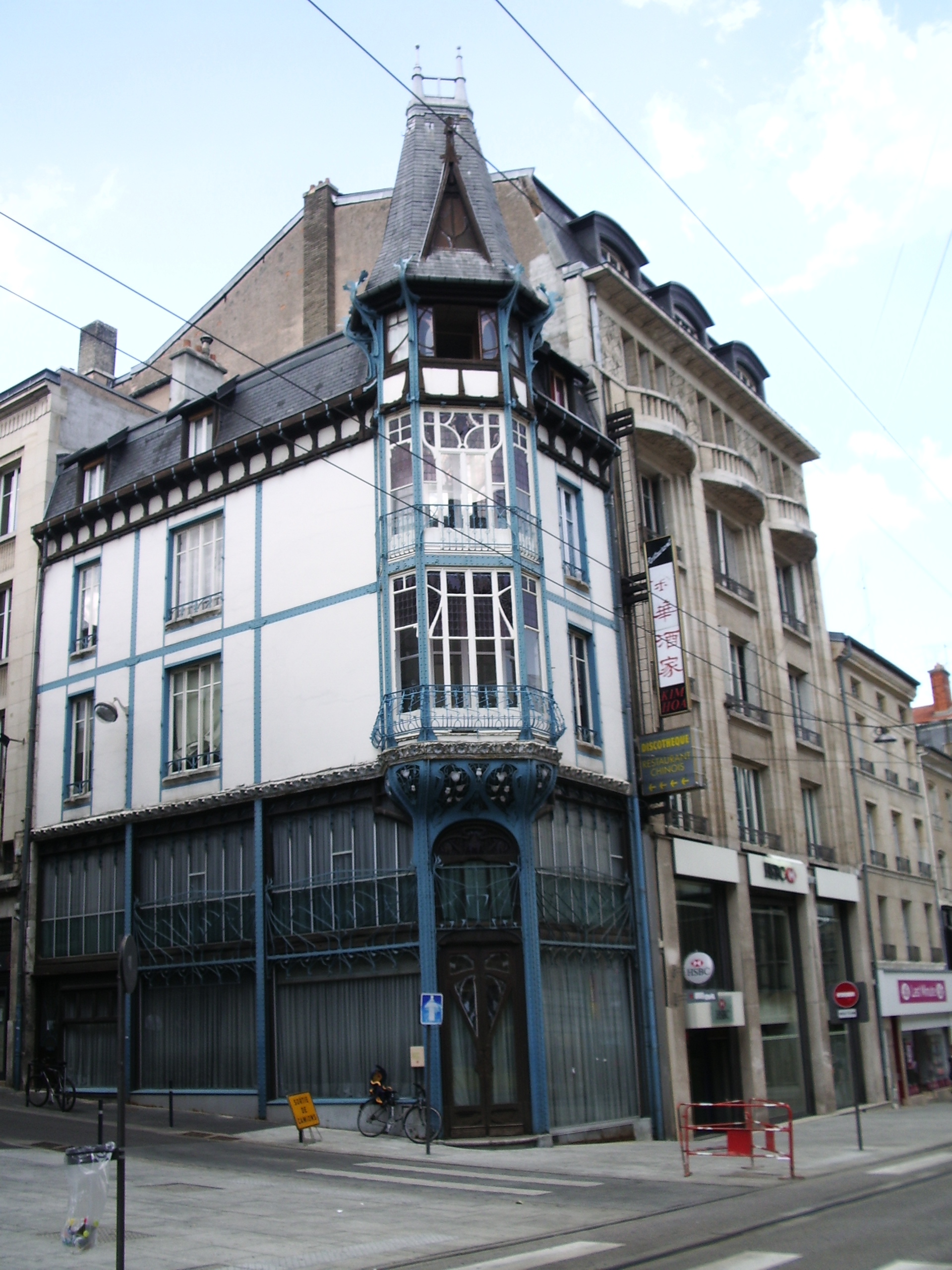 Magasin Génin-Louis. 52, rue Saint-Jean et 2, rue Benit de Nancy.